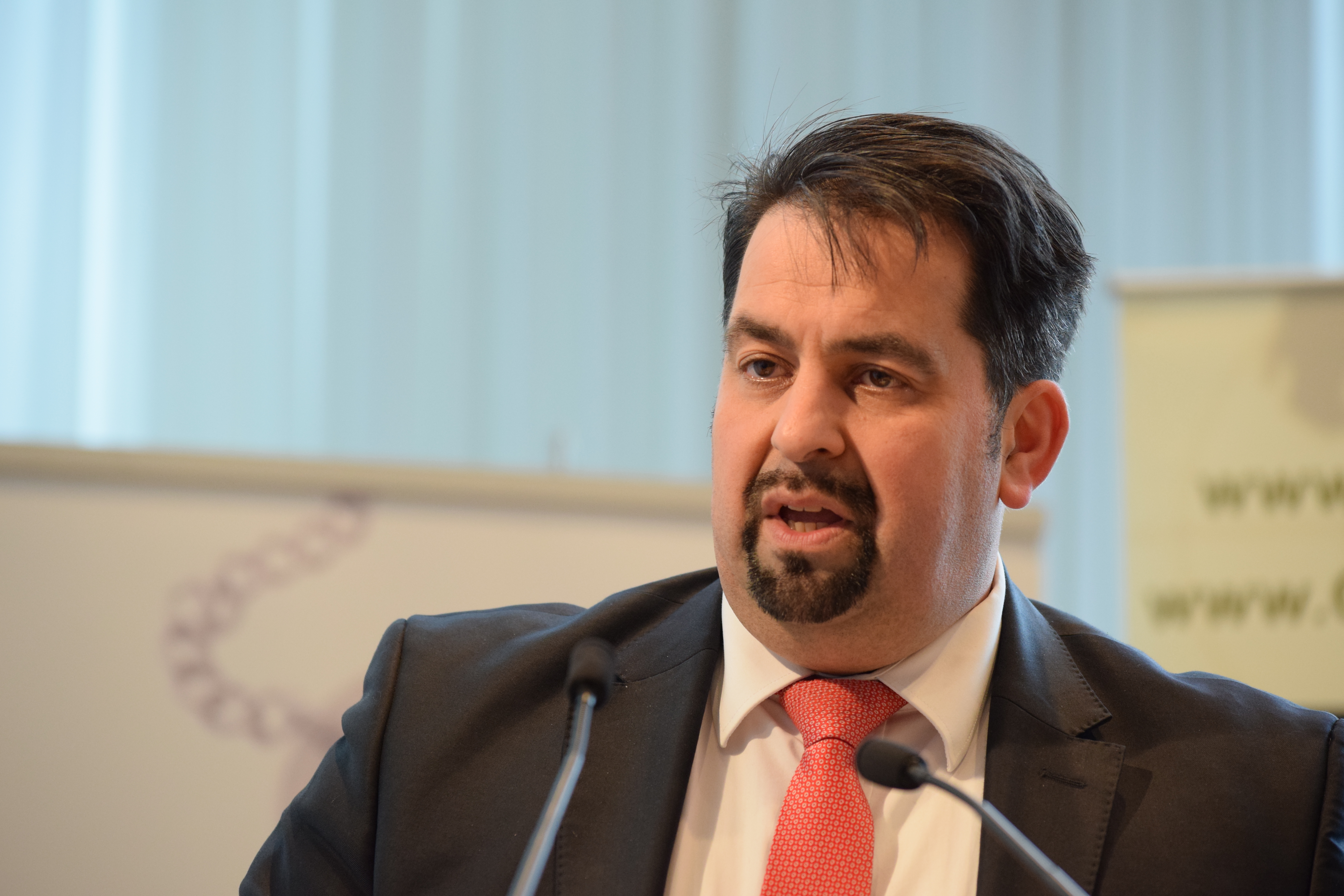 Aiman Mazyek, Zentralrat der Muslime ZDM (Foto: Anna Lutz)